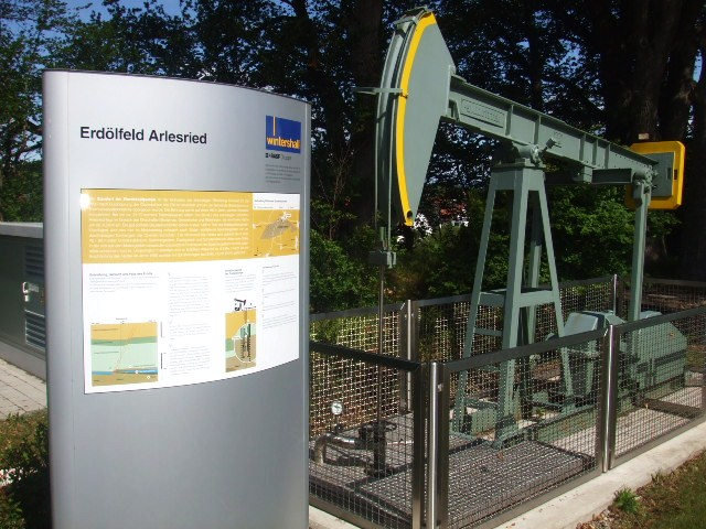 Gemeinde Breitenbrunn, Landkreis Unterallgäu Denkmal am Erdölfeld Arlesried (siehe Erdölförderung_bei_Bedernau)